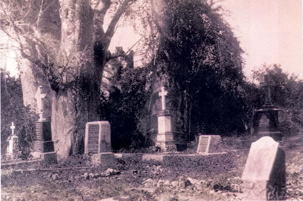 Kiswahili: Haya ni makaburi ya kisiwa cha Toten yalivyokuwa yakionekana mwaka 1928. Picha kutoka maktaba ya URITHI Tanga.